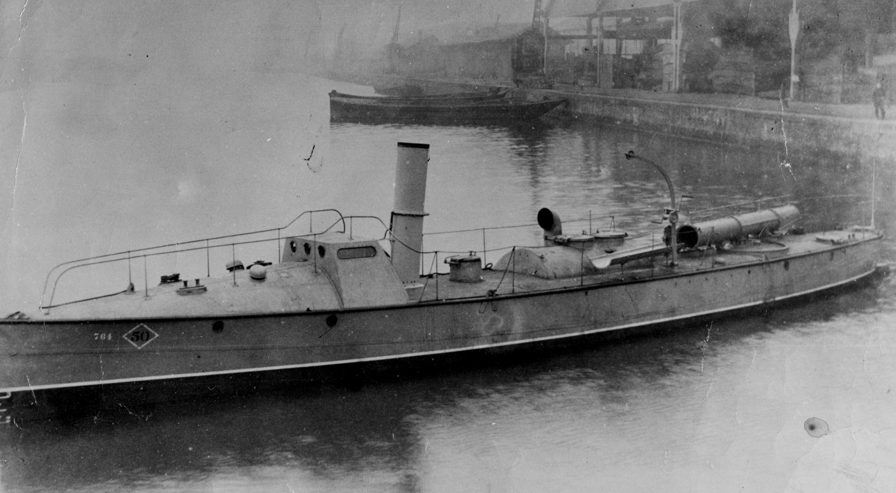 Torpedera de río clase Nº 50, astillero Yarrow.